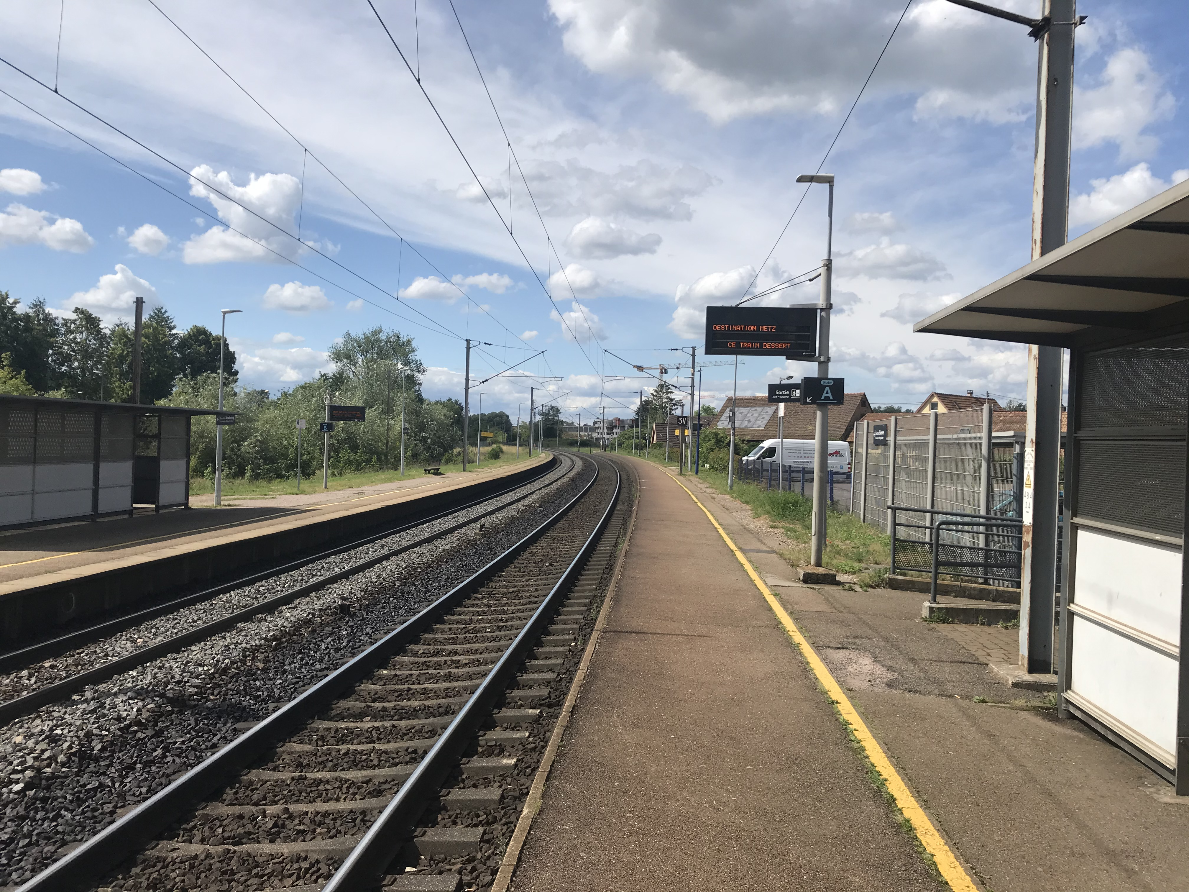 Vue depuis la voie A de la gare de Brumath en direction de Saverne/Sarrebourg.